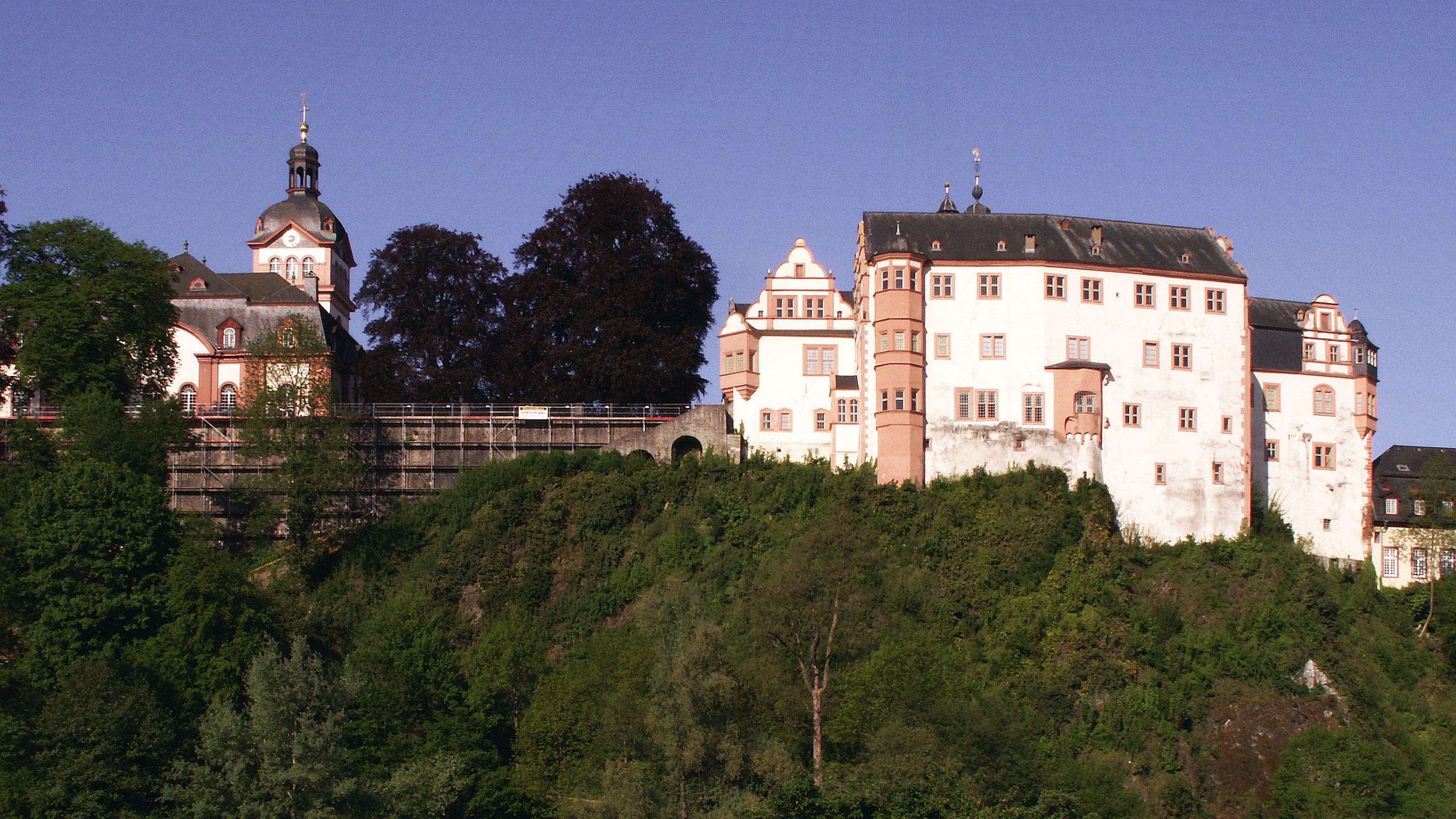 Ostansicht in früher Morgensonne von der Schlosskirche und dem Schloss Weilburg (errichtet bis 1590) oberhalb der Lahn in Hessen Germany - Foto Wolfgang Pehlemann PICT0175